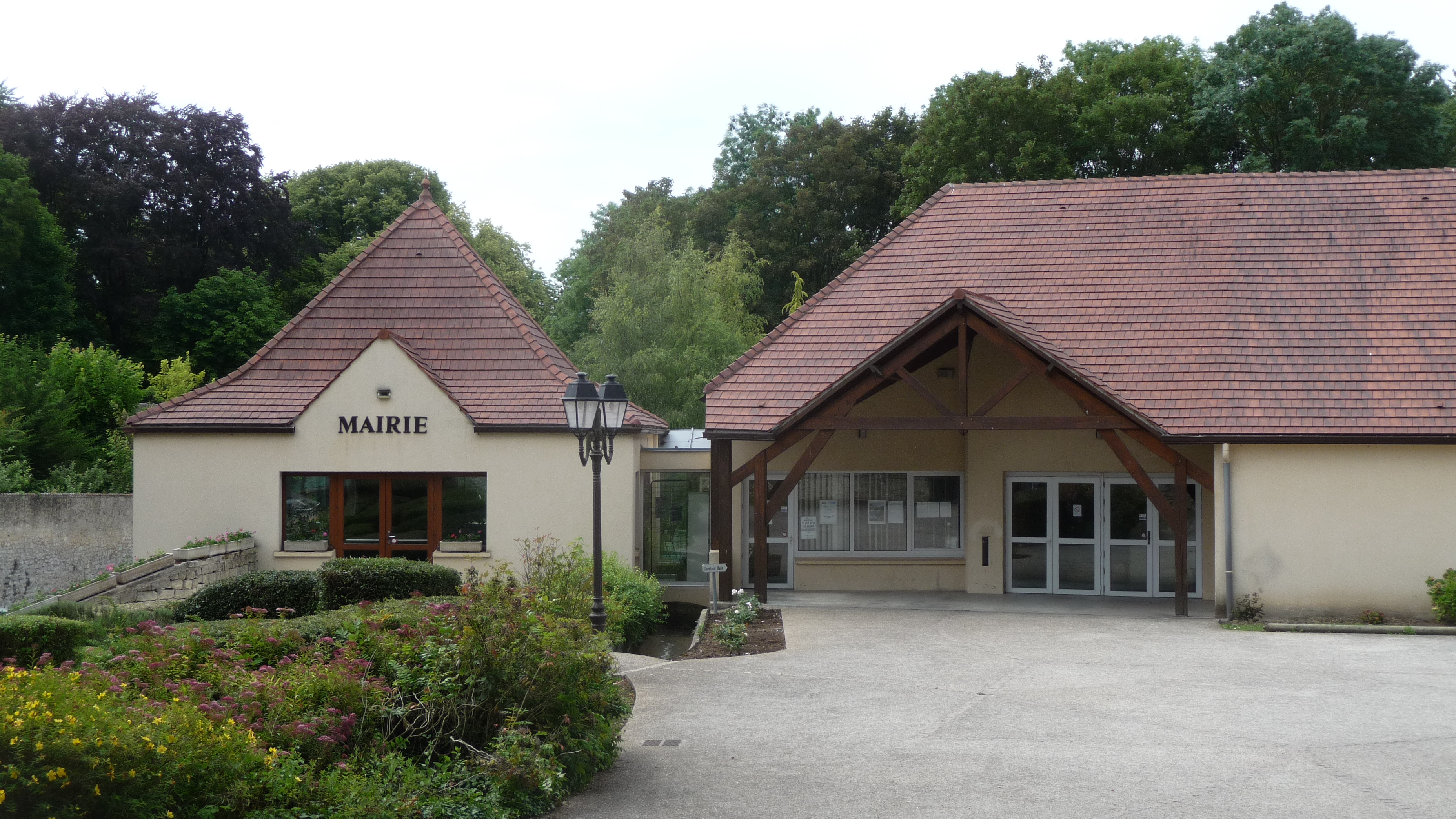 Gaillon-sur-Montcient (Yvelines - France), vue de la mairie